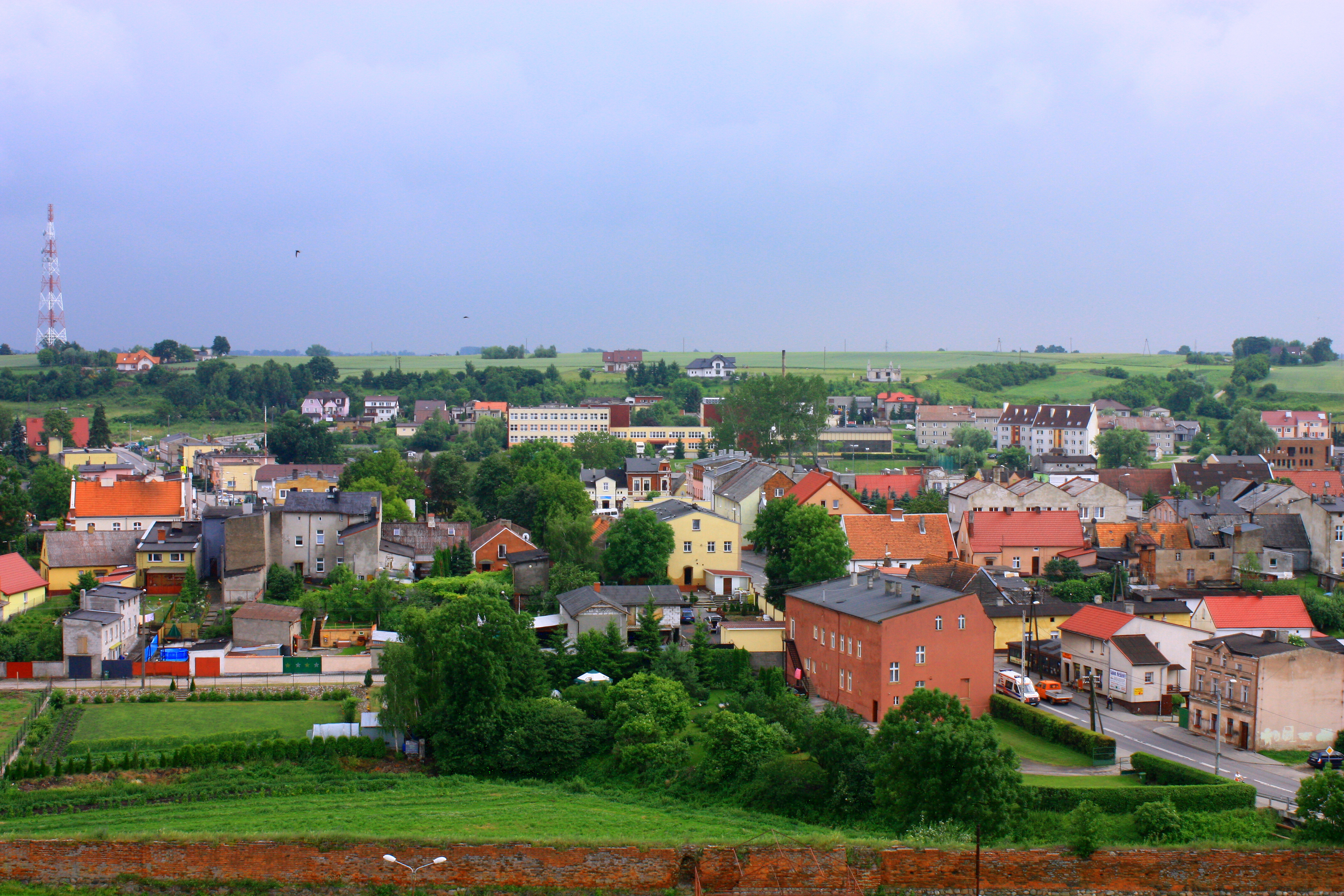 Radzyń Chełmiński, ruiny zamku, 2 poł. XIII - 1 poł. XIV